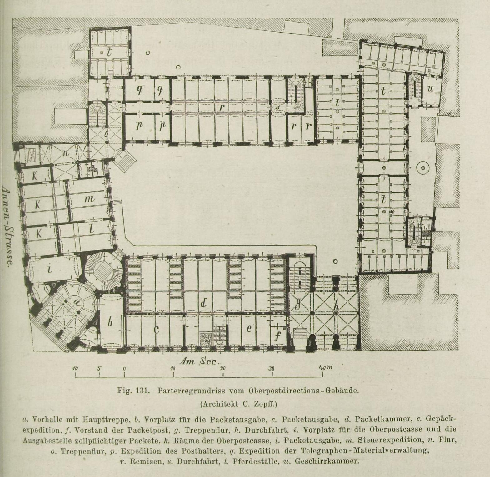 siehe Bildtext aus: Die Bauten, technischen und industriellen Anlagen von Dresden. Herausgegeben vom Sächs. Ingenieur- und Architekten-Verein und vom Dresdener Architekten-Verein. Meinhold, Dresden 1878